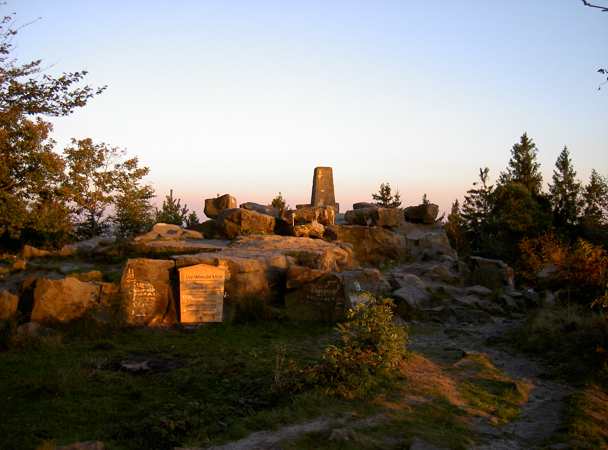 Die lippische Velmerstot mit Gedenkstein im Sonnenuntergang.